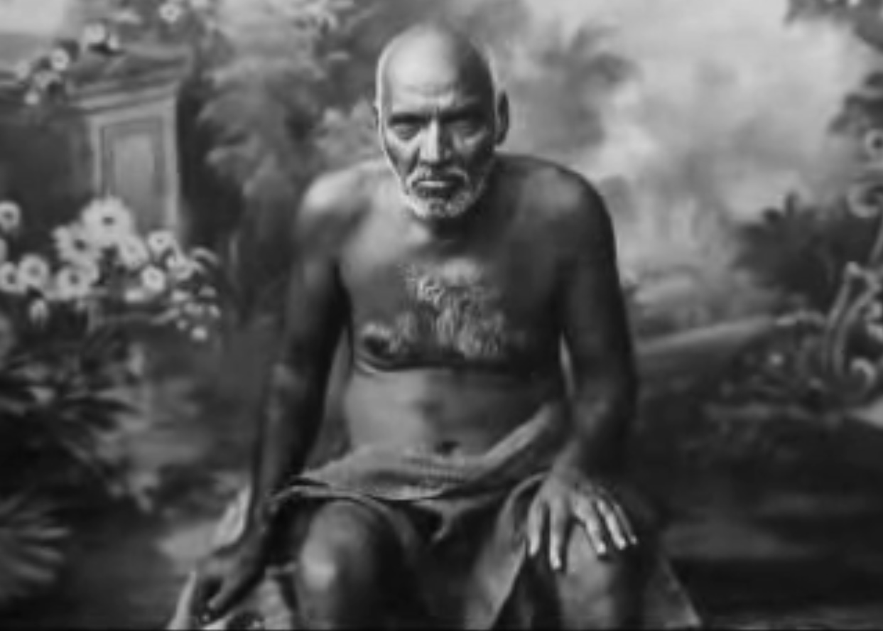 Upasni Maharaj